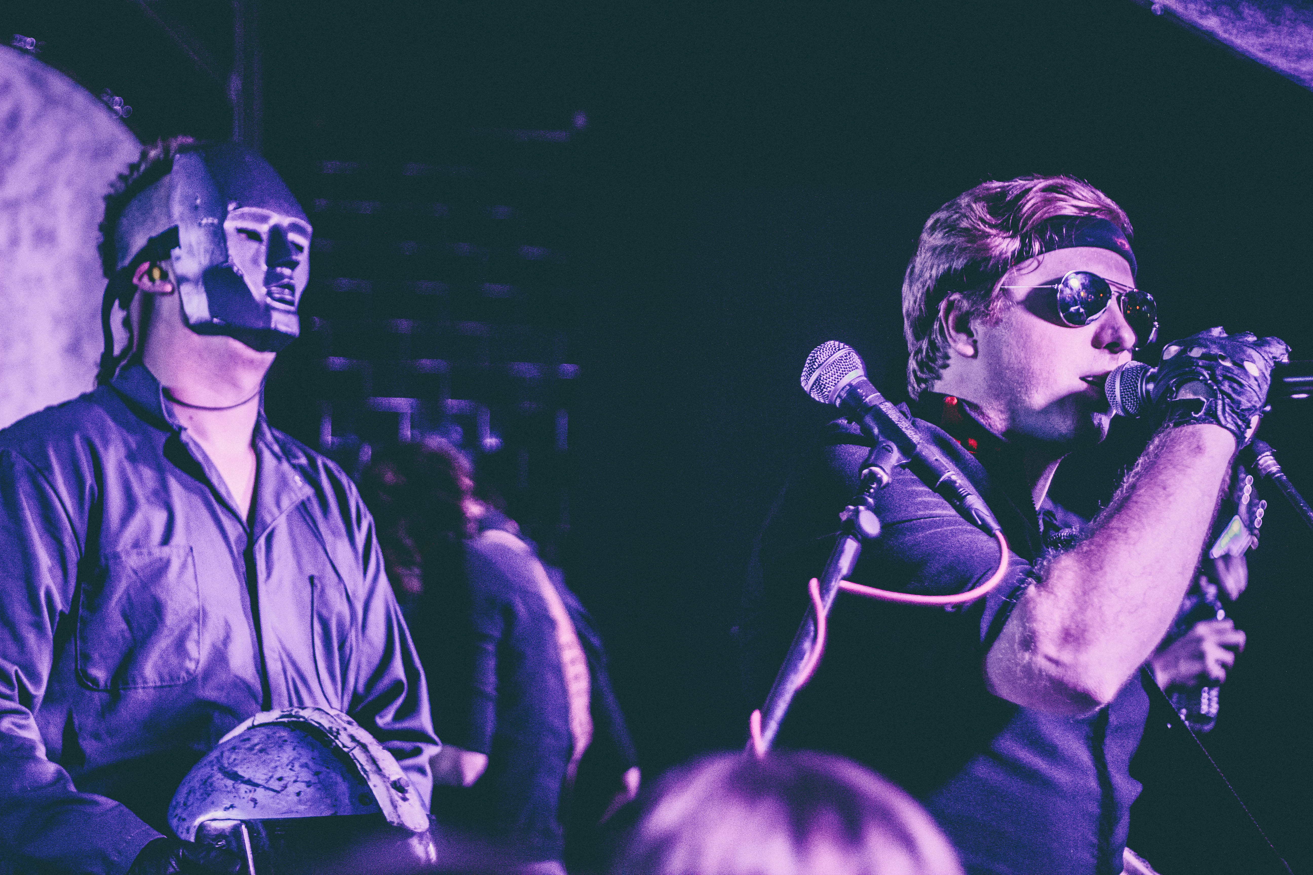 Protomen Concert